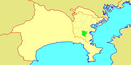 Map of Kōnan-ku, Yokohama, Kanagawa-prefecture, Japan